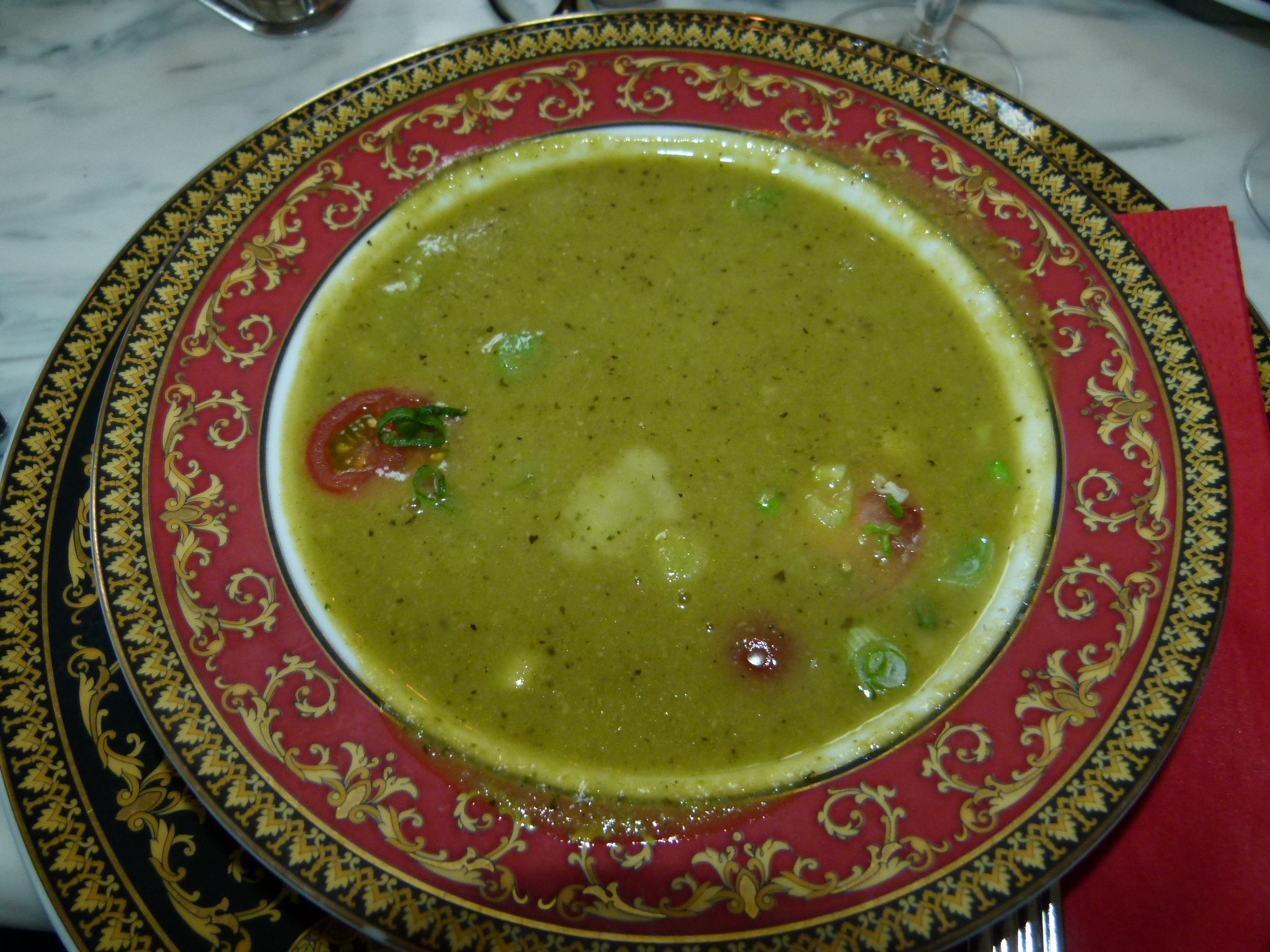 Grüne Bohnencremesuppe mit Mozzarella, Restaurant Coselpalais Dresden